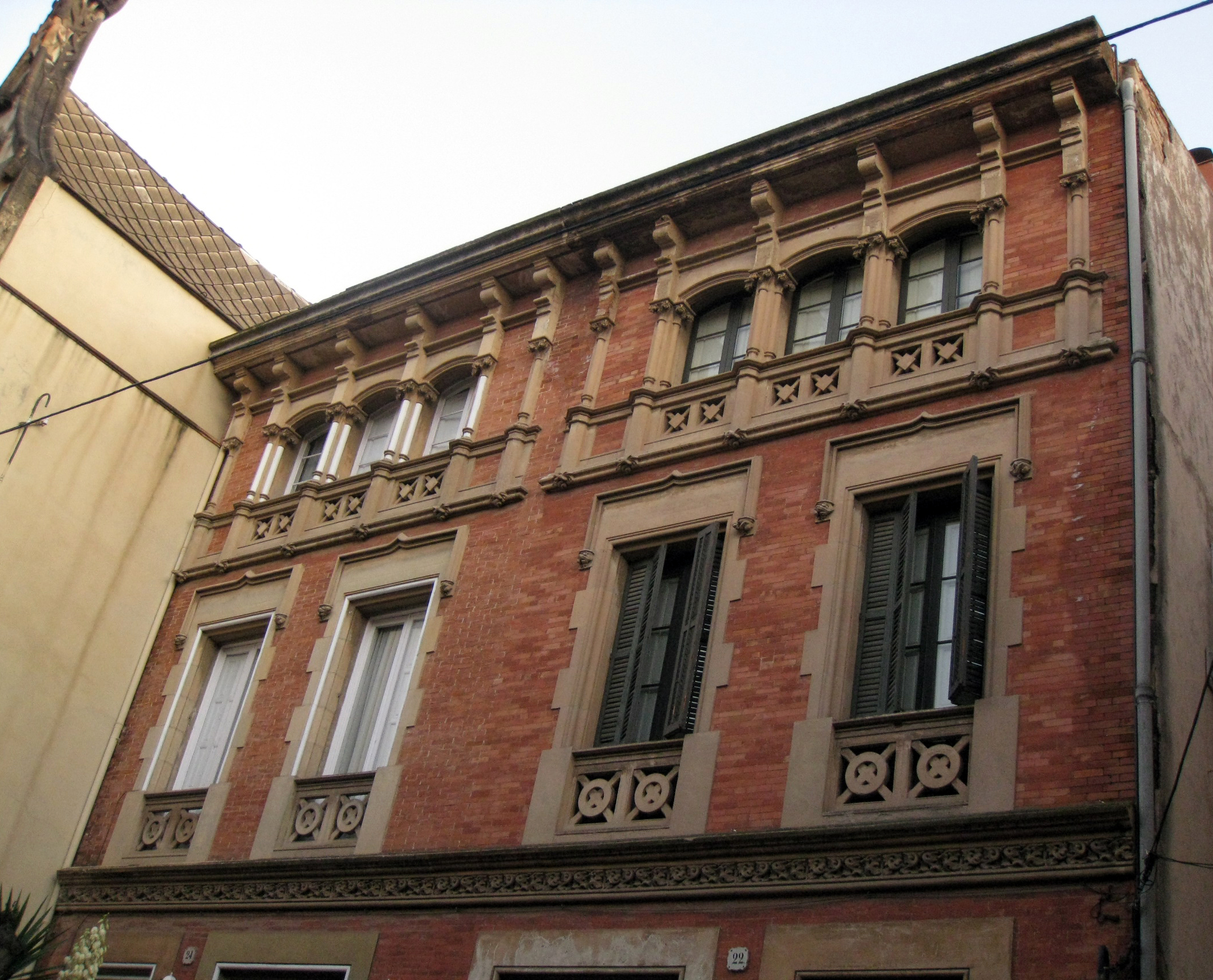 Cases Soler Bohigas, al carrer de Sant Jaume núm. 22-24 (Terrassa). Edifici historicista de Rafael Puig i Puig (1893).